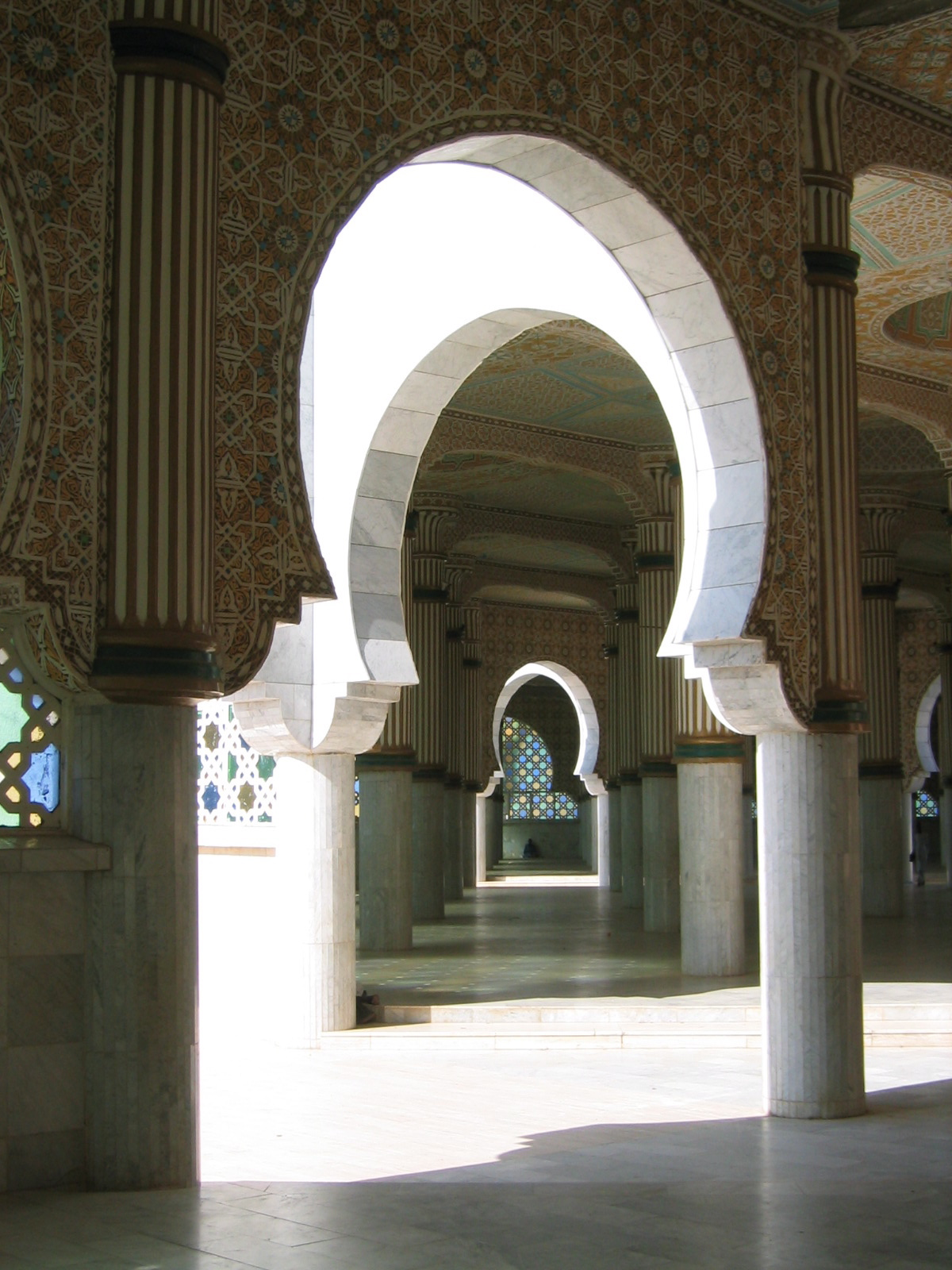 Touba, Senegal, Moschee